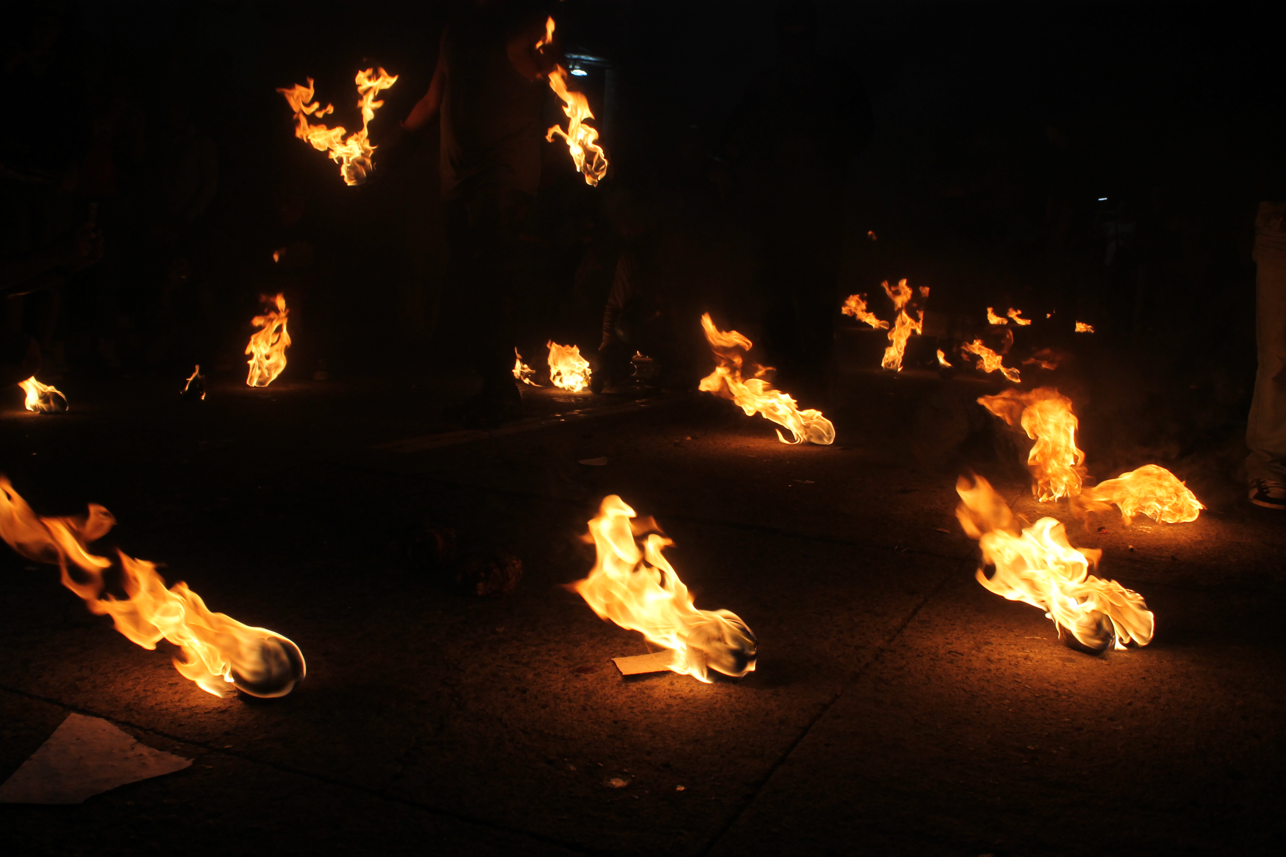 Galeria Bolas de FuegoNejapa2013